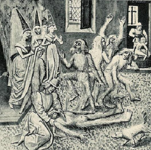 Description : Représentation du Bal des Ardents Auteur